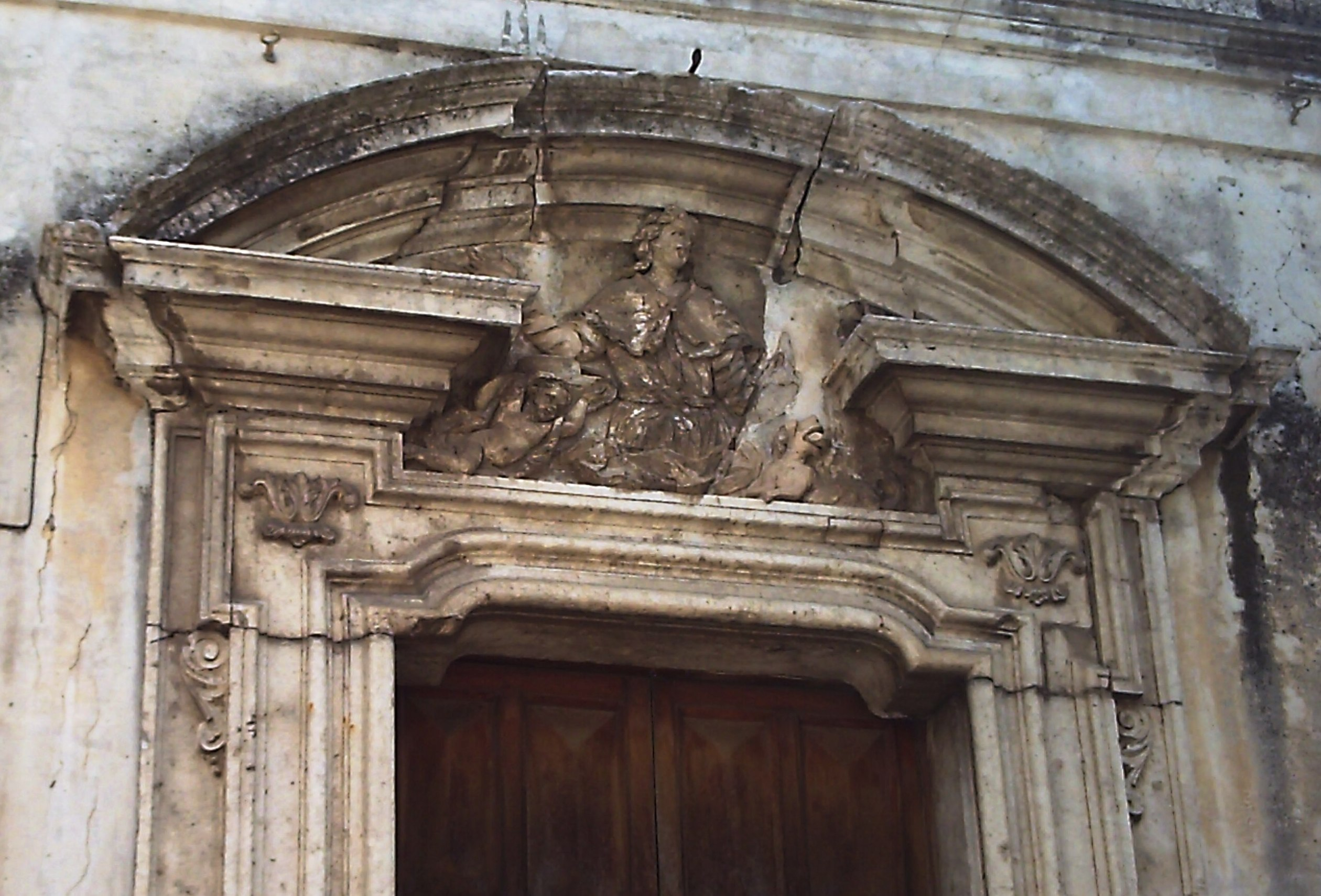 Particolare del portale della Chiesa di San Rocco di Guardia Sanframondi (Bn)